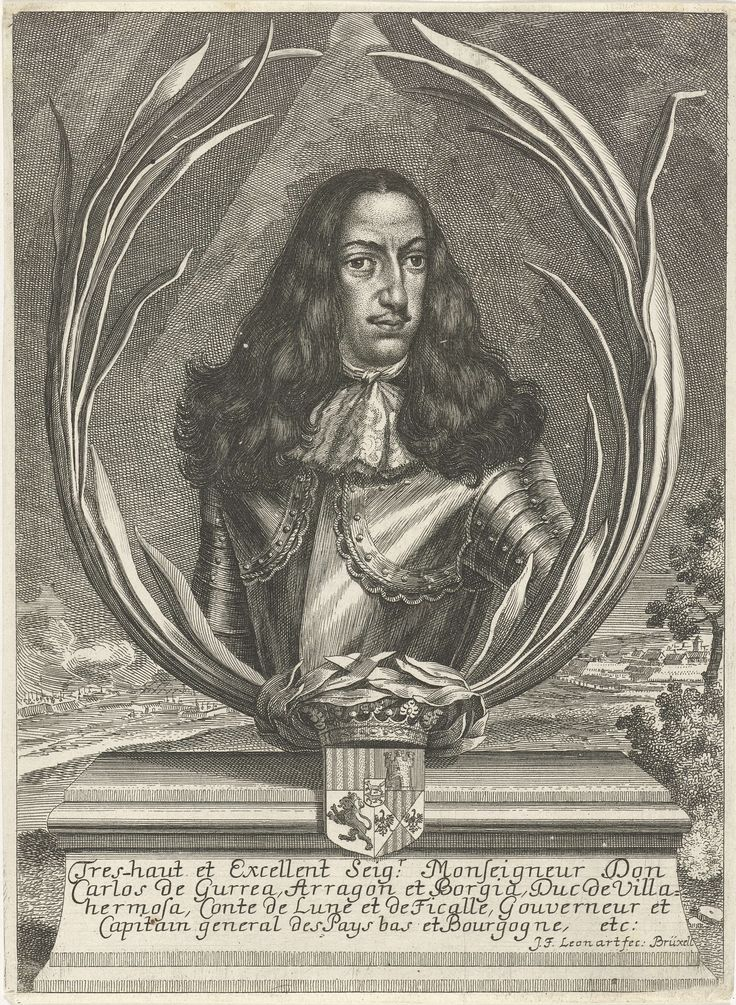 Retrato de Carlos Gurrea y Aragón, duque de Villahermosa... gouverneur et capitain general des Pays Bas et de Borgougne, grabado, firmado J.F. Leonart fec: Brüxell